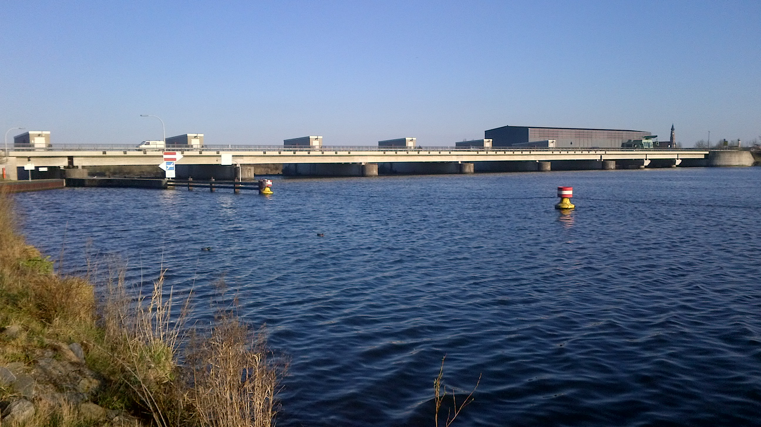 Donaubrücke in Straubing an der sog. Westtangente an der Staustufe Straubing bei Flusskilometer 2321,820